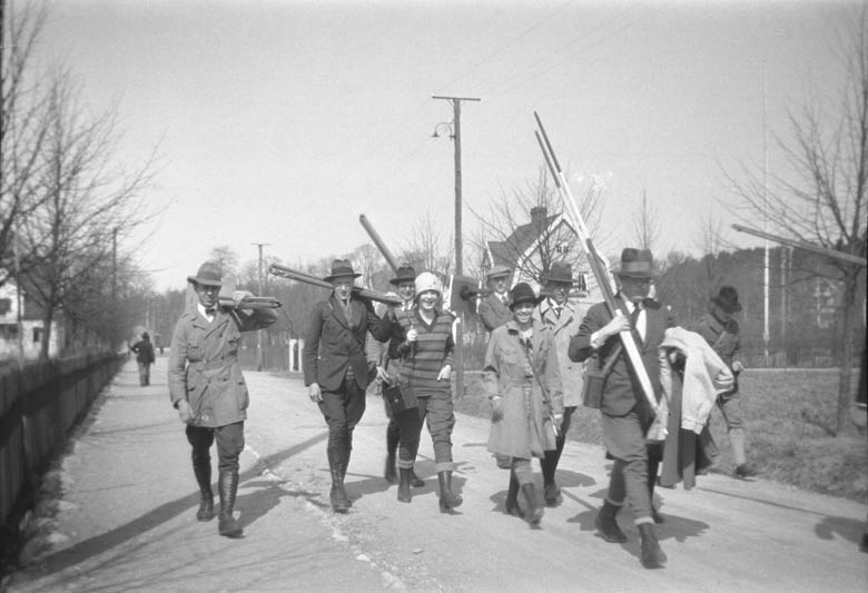 RAÄ-nummer Sollentuna 37:1. Arkeologer på väg till utgrävning av gravfältet Engelska parken. Motiv: Sollentuna 37:1 Kategori: Personer, Arkeologisk undersökning RAÄ-nummer Sollentuna 37:1. Arkeologer på väg till utgrävning av gravfältet Engelska parken. Sollentuna 37:1.